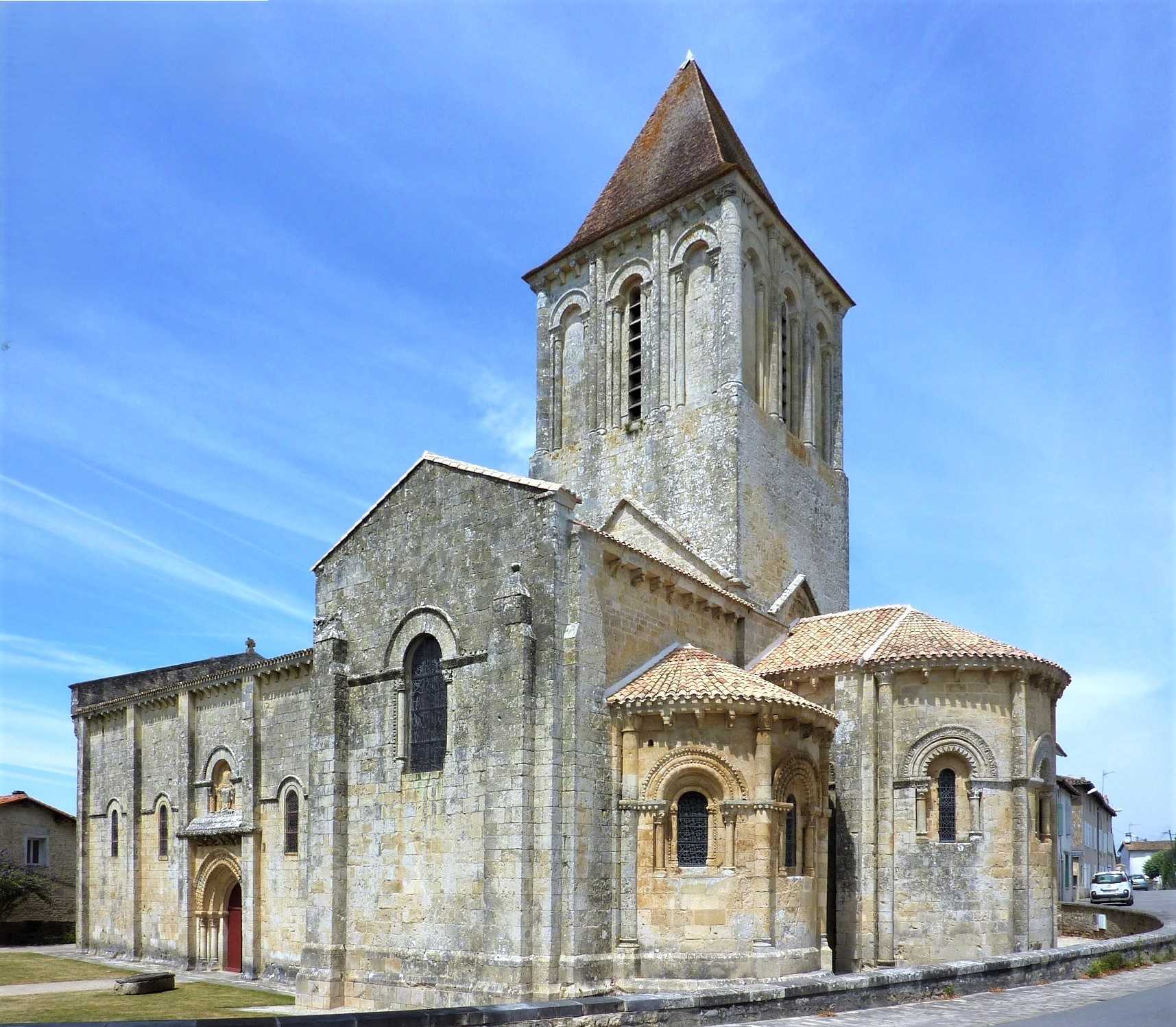 Église Saint-Pierre de Melle